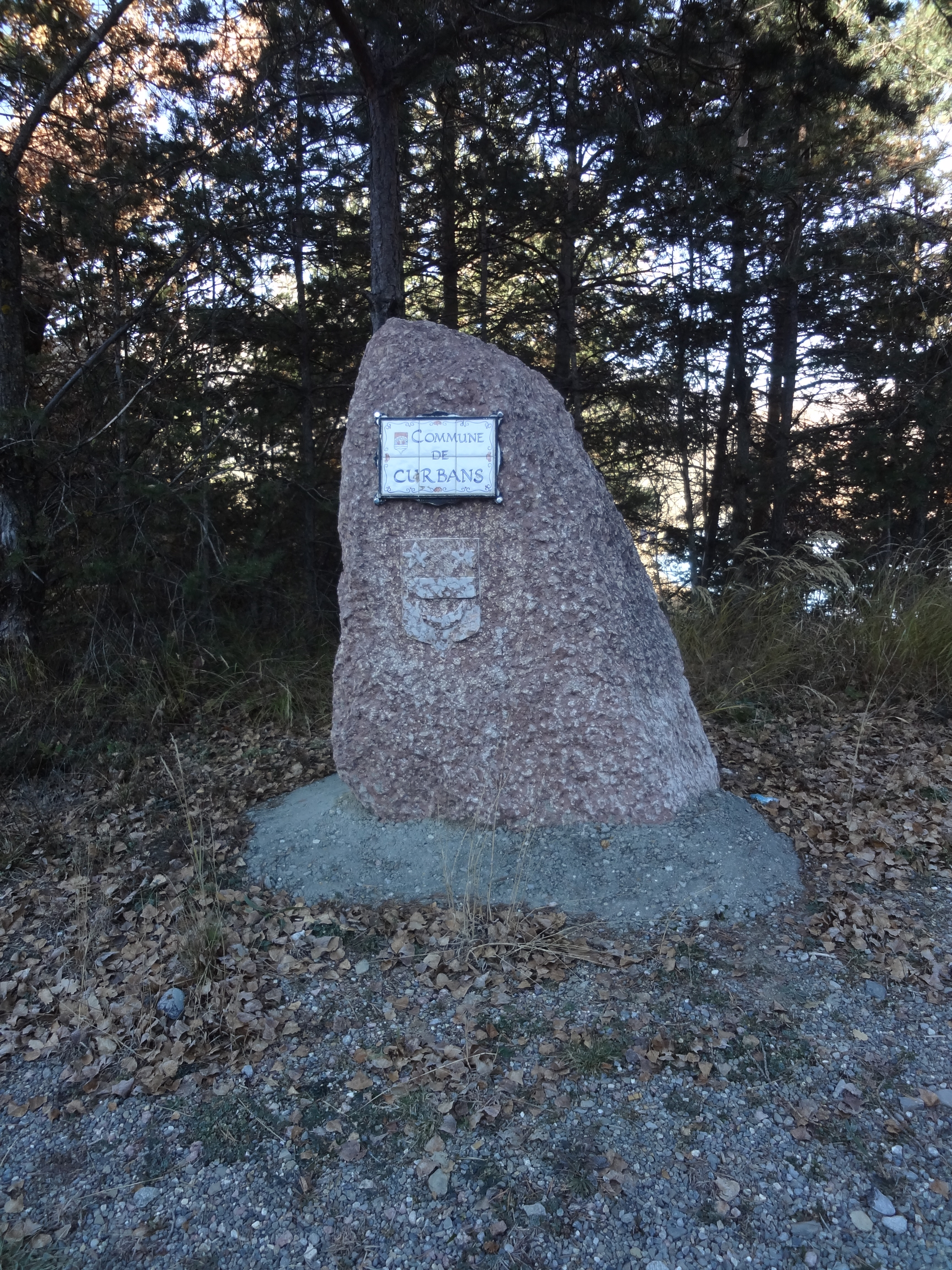 stèle marquant l'entrée sud de la commune de Curbans, au bord de la RD 4.